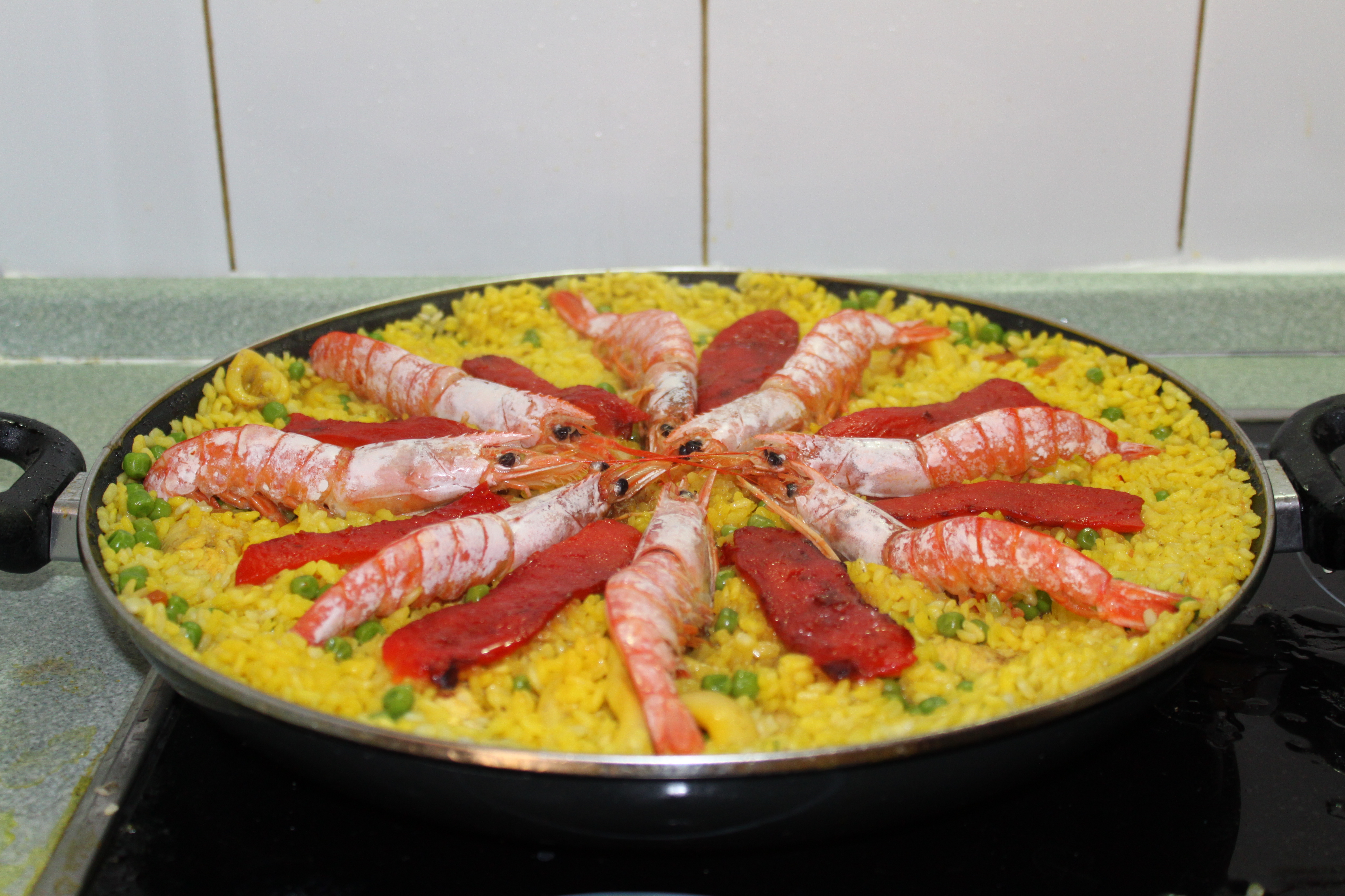 selbstgemachte spanische Paella, Spanien 2010